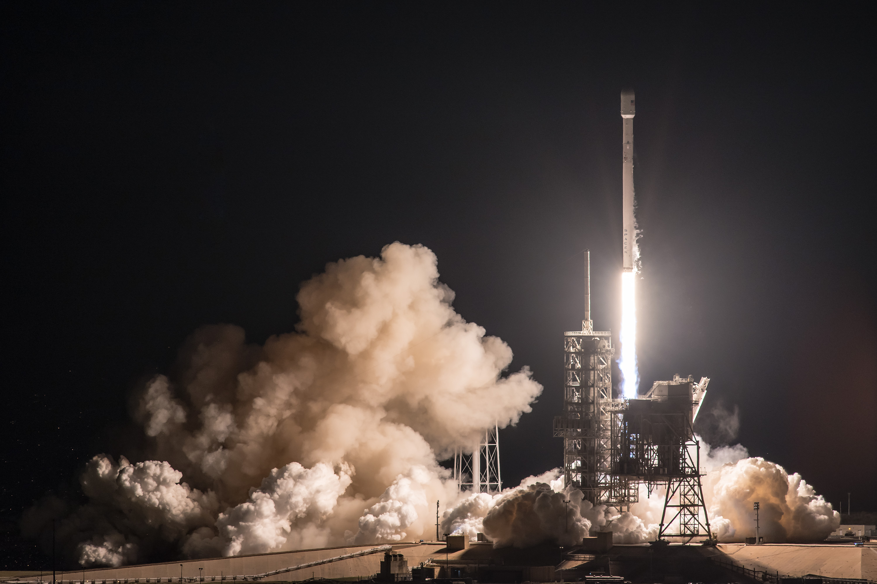 EchoStar XXIII Launch